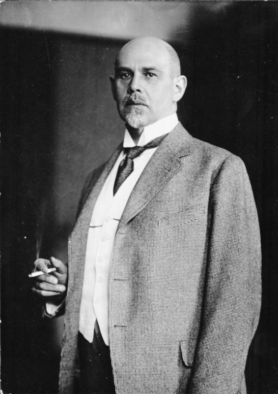 ADN-Zentralbild, Dr. Walter Rathenau geb. 1867 gest. 1922 1922 Aussenminister, schloss mit Sowjetrußland 1922 den Vertrag von Rapallo. Er wurde durch die Geheimorganisation Consul ermordet, deren Hintermänner die Schwerindustrie war.